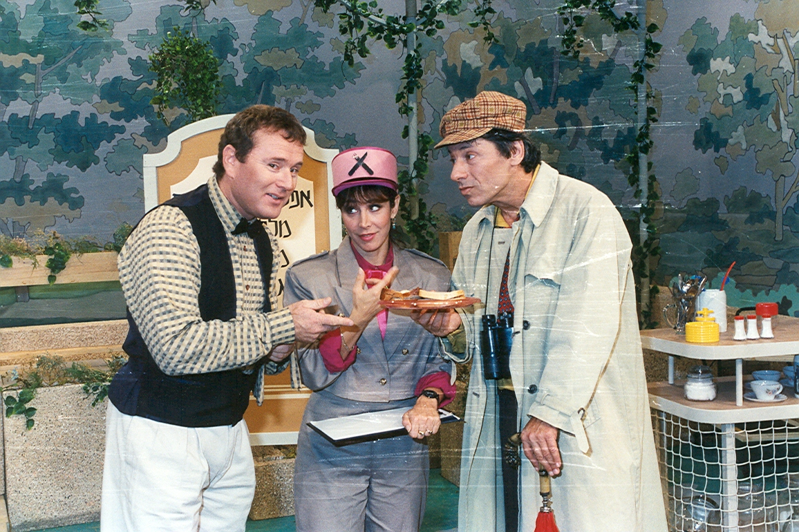 בלי סודות הייתה תוכנית טלוויזיה לימודית, אשר שודרה בטלוויזיה החינוכית הישראלית באמצע שנות השמונים, בהמשך בגלל הפופולריות הגדולה נוצרה תוכנית המשך, "בסוד העניינים", אשר הופקה בשנים 1991-1992.